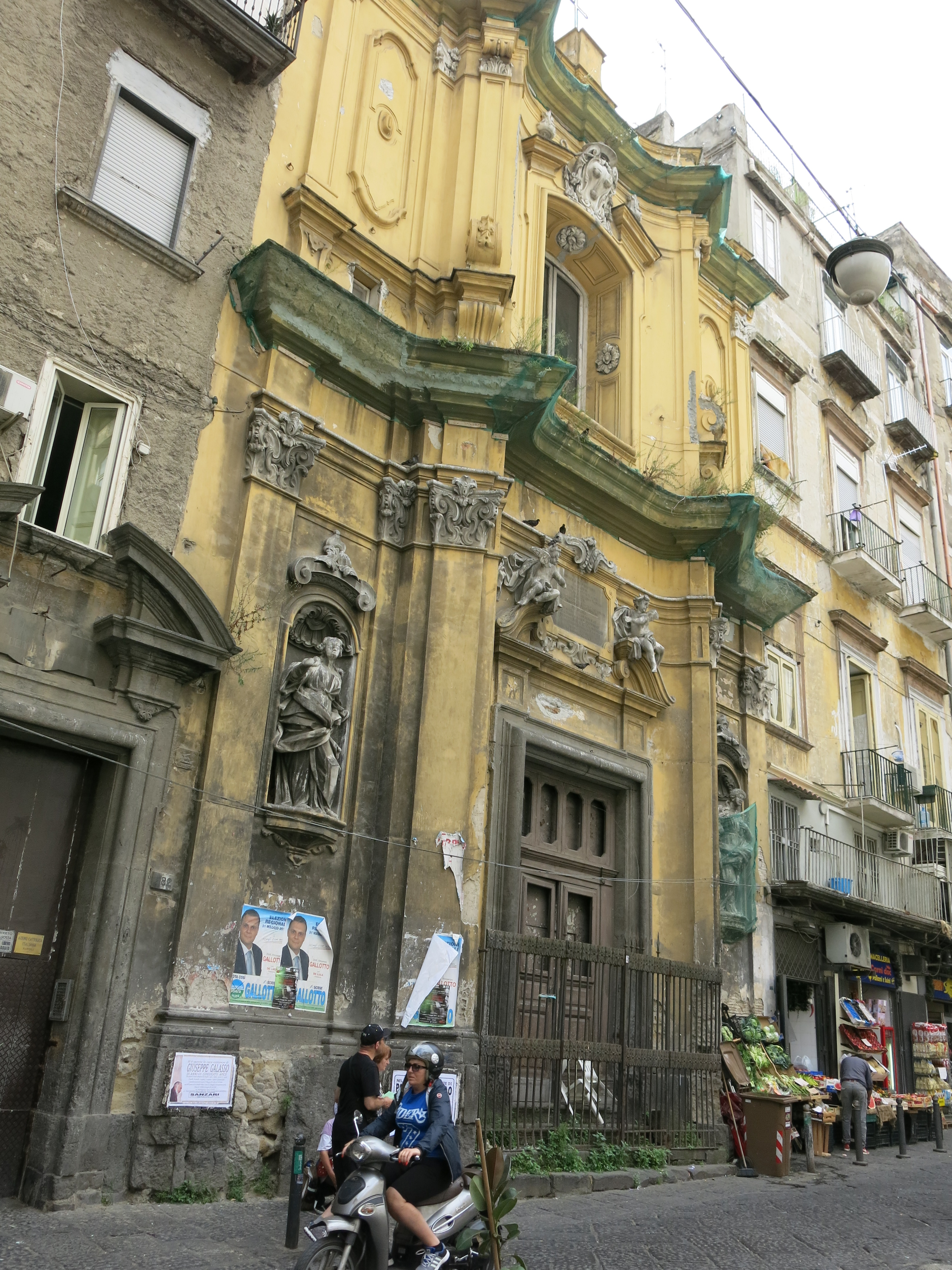 Le chiese di Napoli